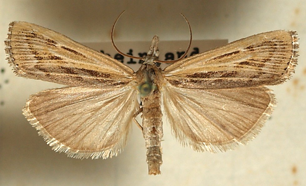 Pediasia fascelinella